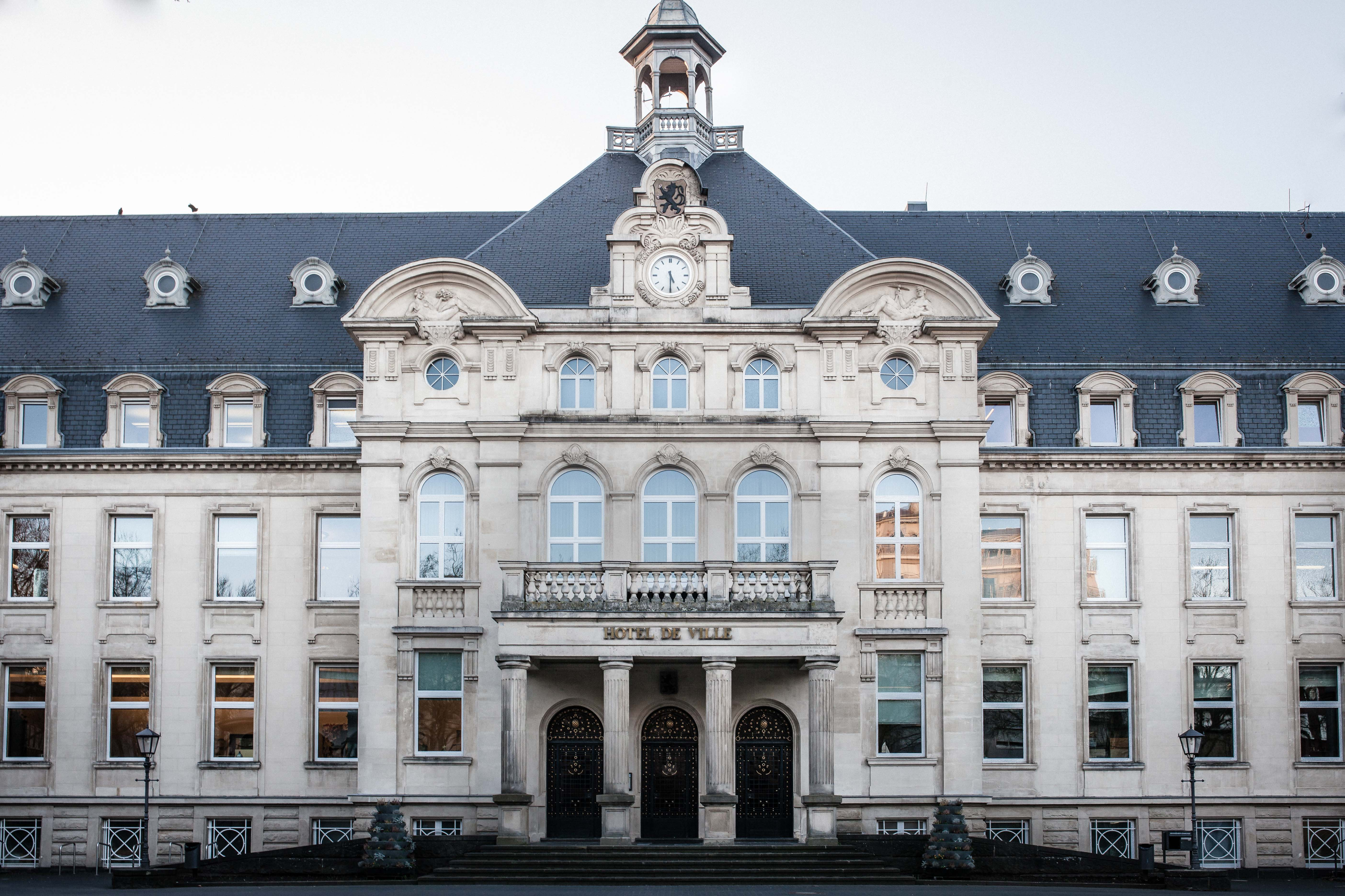 Das Rathaus der Stadt Düdelingen.